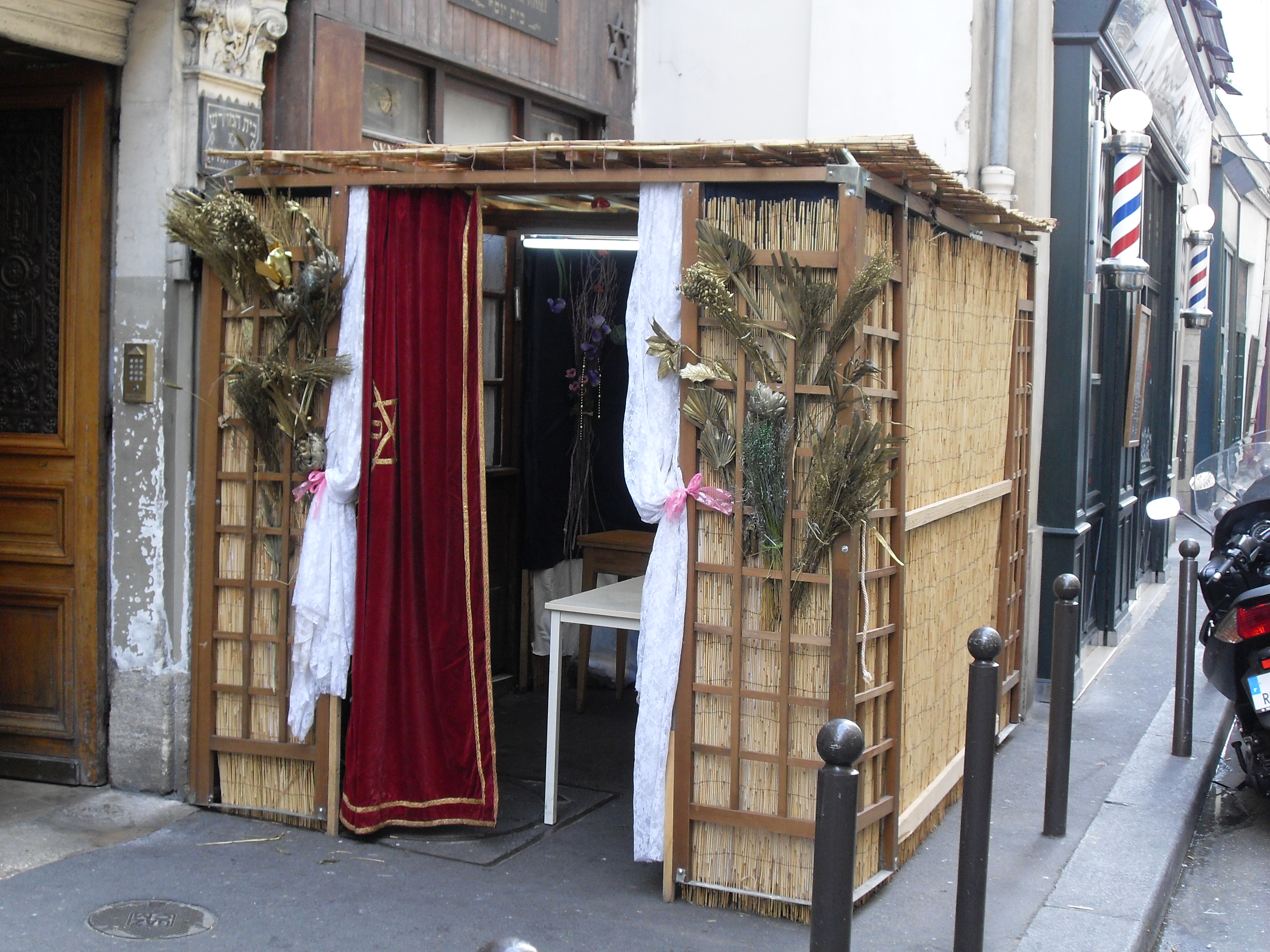 Soucca, Synagogue Beith Yossef, Pletzl, Marais, 18 rue des Ecouffes, IVe arrondissement, Paris, France